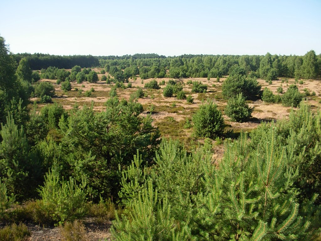 Puszcza Bydgoska - były poligon Kabat